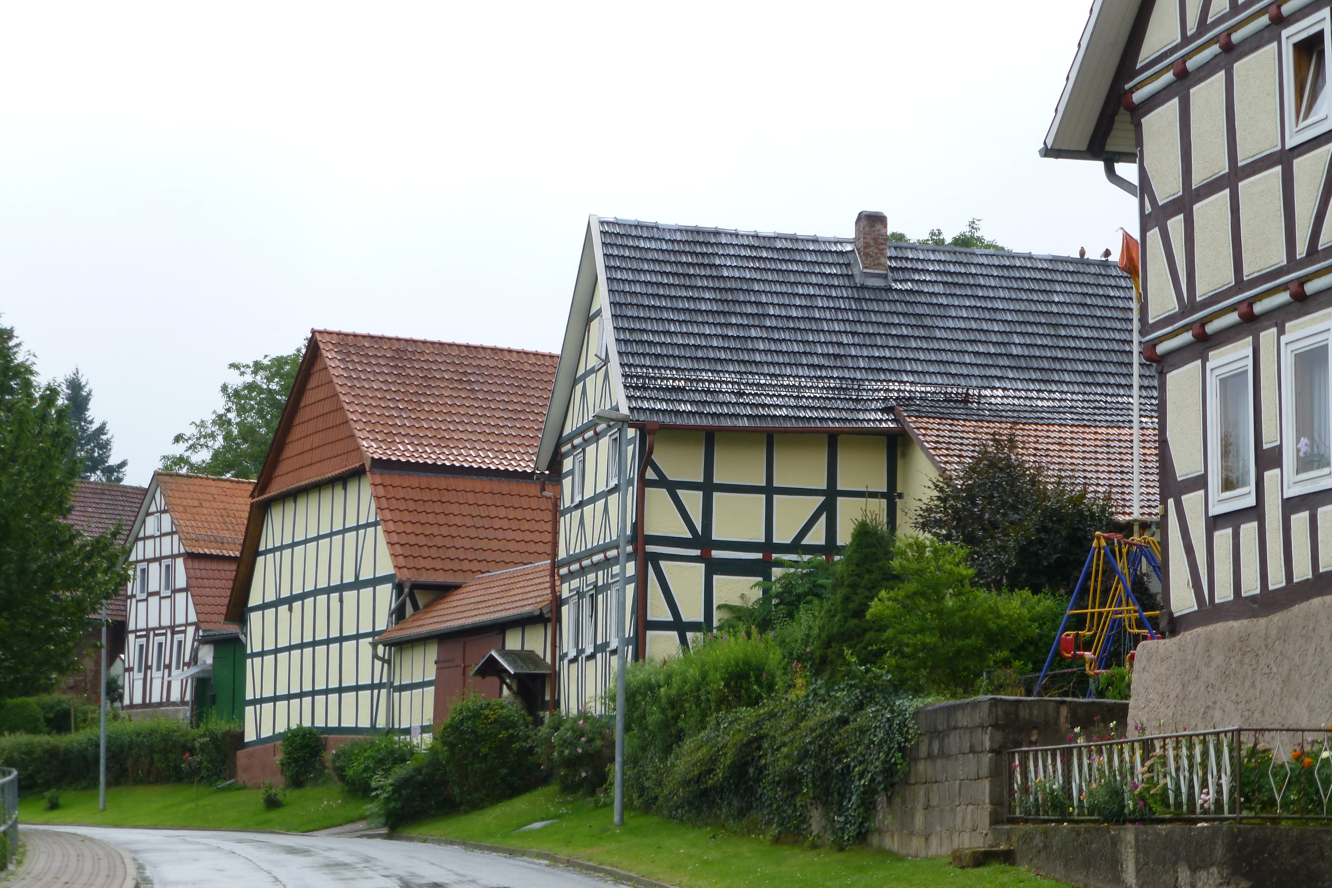 Dorfstraße mit Fachwerkgebäuden in Glasehausen, Landkreis Eichsfeld, Thüringen.